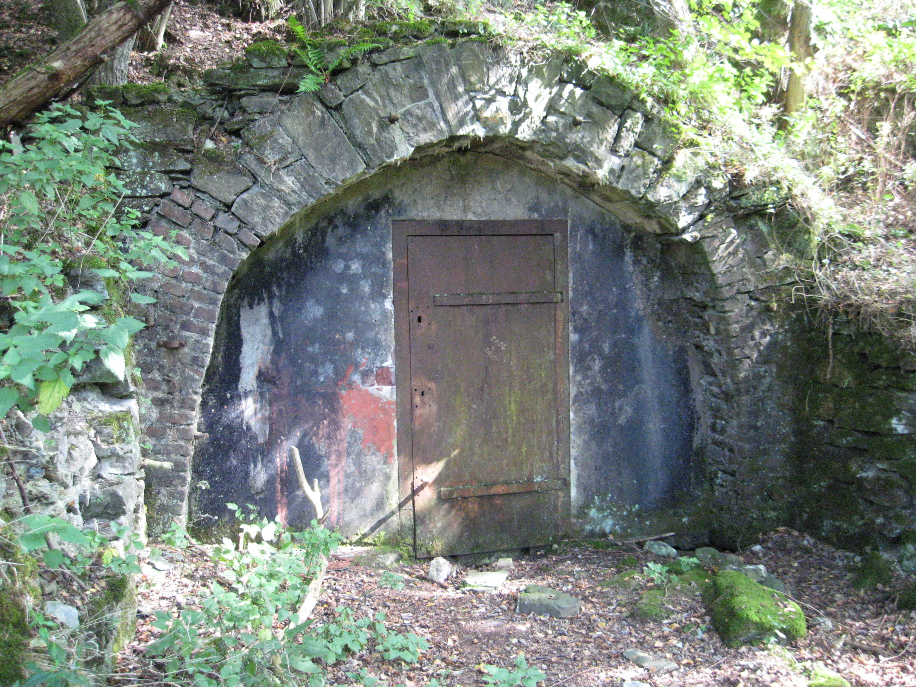 Grube Ameise im Leimbachtal bei Siegen (stillgelegt November 1956): Stolleneingang Theresien-Stollen im Jahr 2009